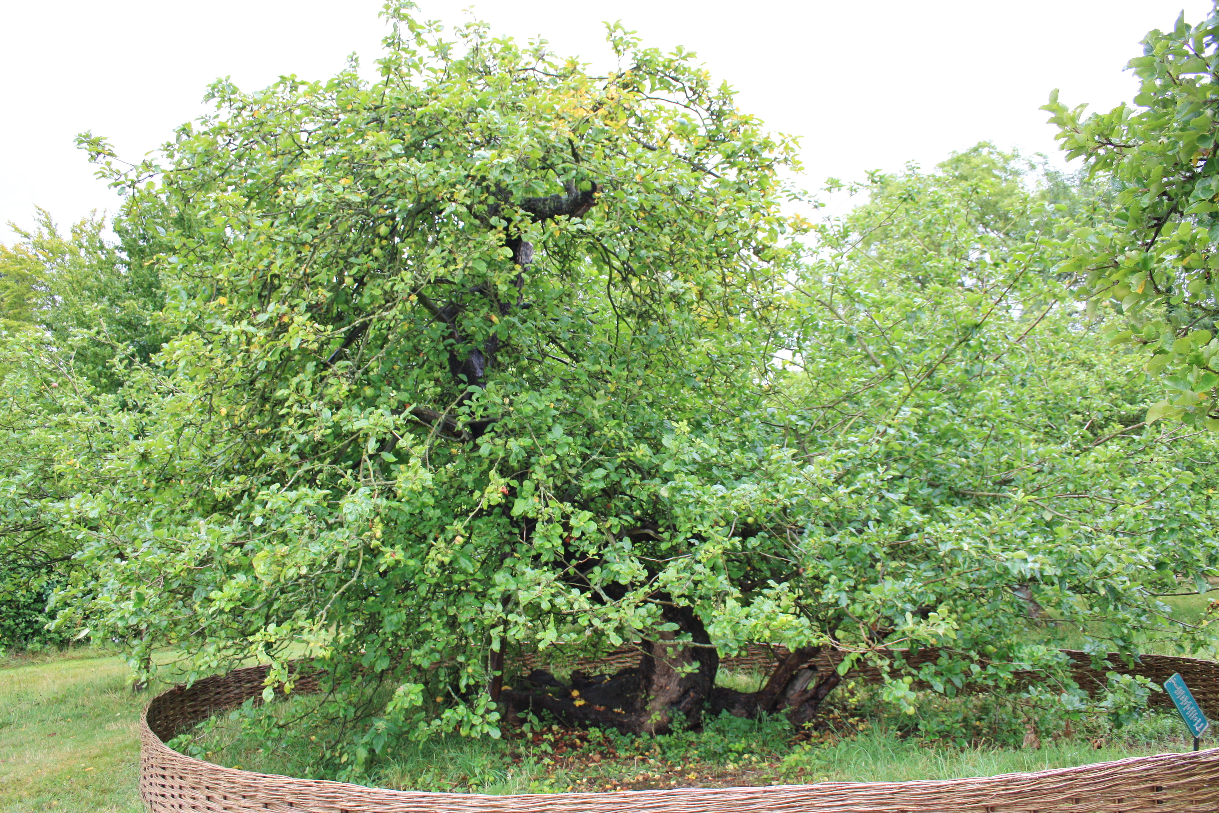 Apfelbaum im Garten von Woolsthorp Manor, dem Geburtshaus Sir Isaac Newtons